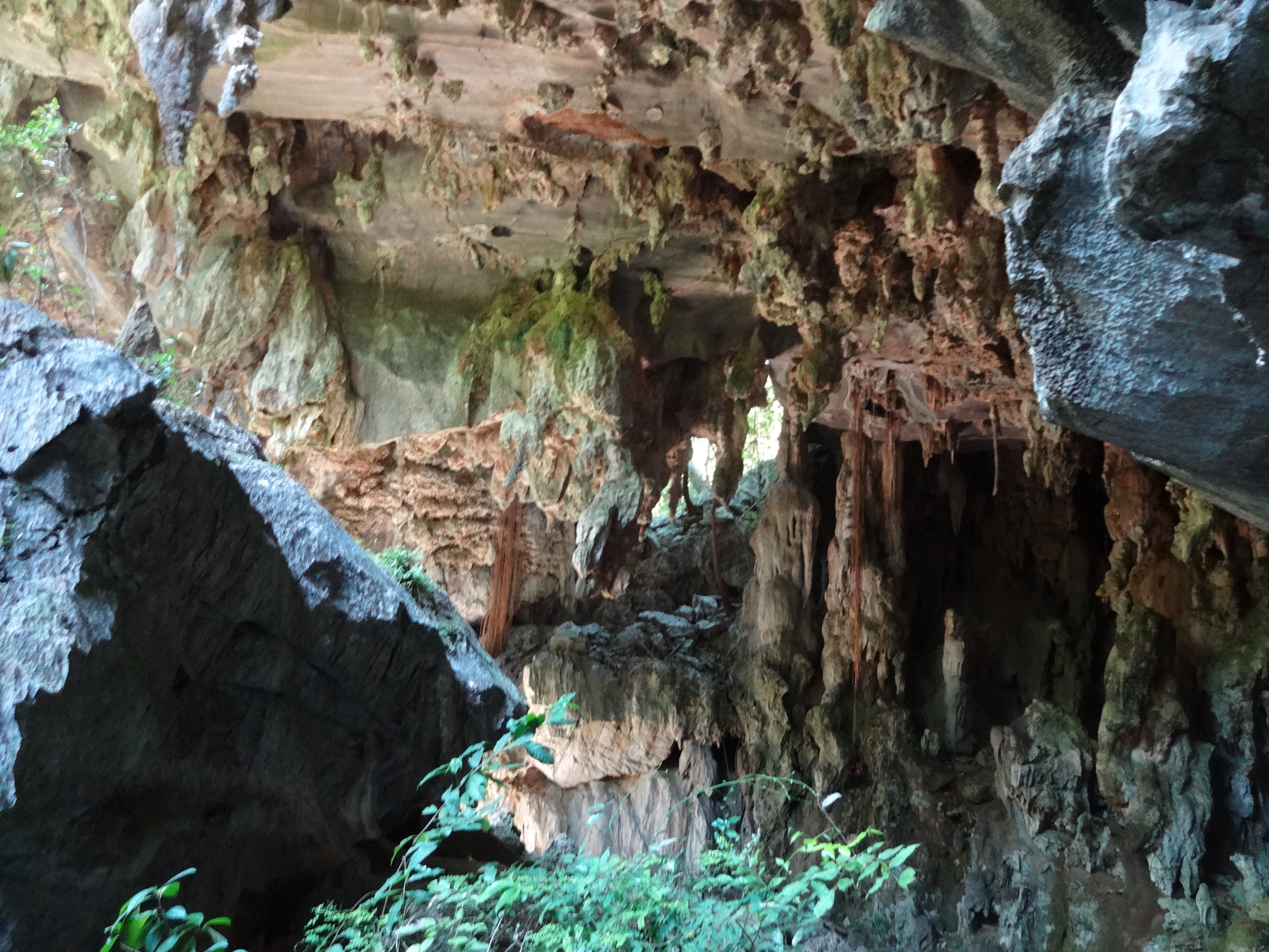 Caverna de Santo Tomás bei El Moncada im Vinalestal in der Provinz Pinar del Rio in Kuba